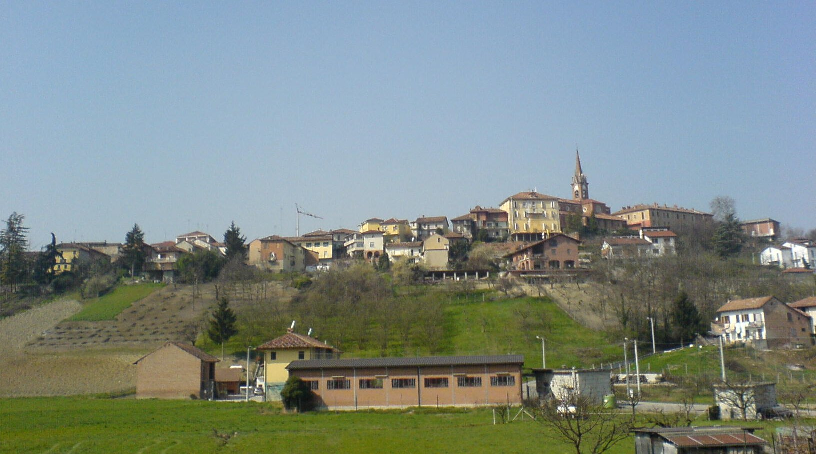 Il centro di Priocca.